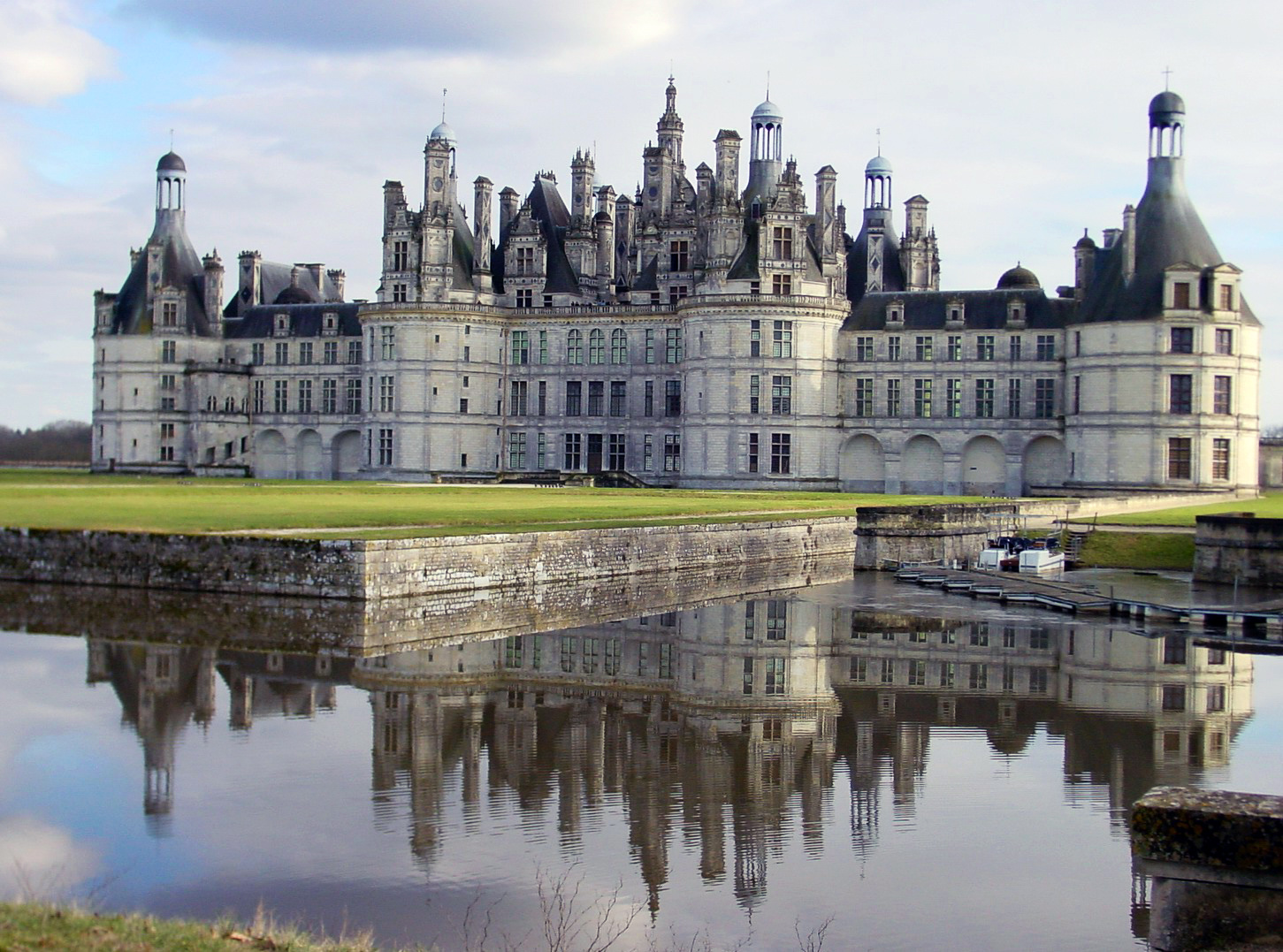 Das Schloss Chambord an der Loire in France